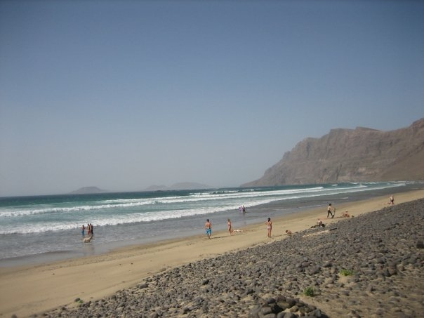 Playa y risco de Famara, Lanzarote